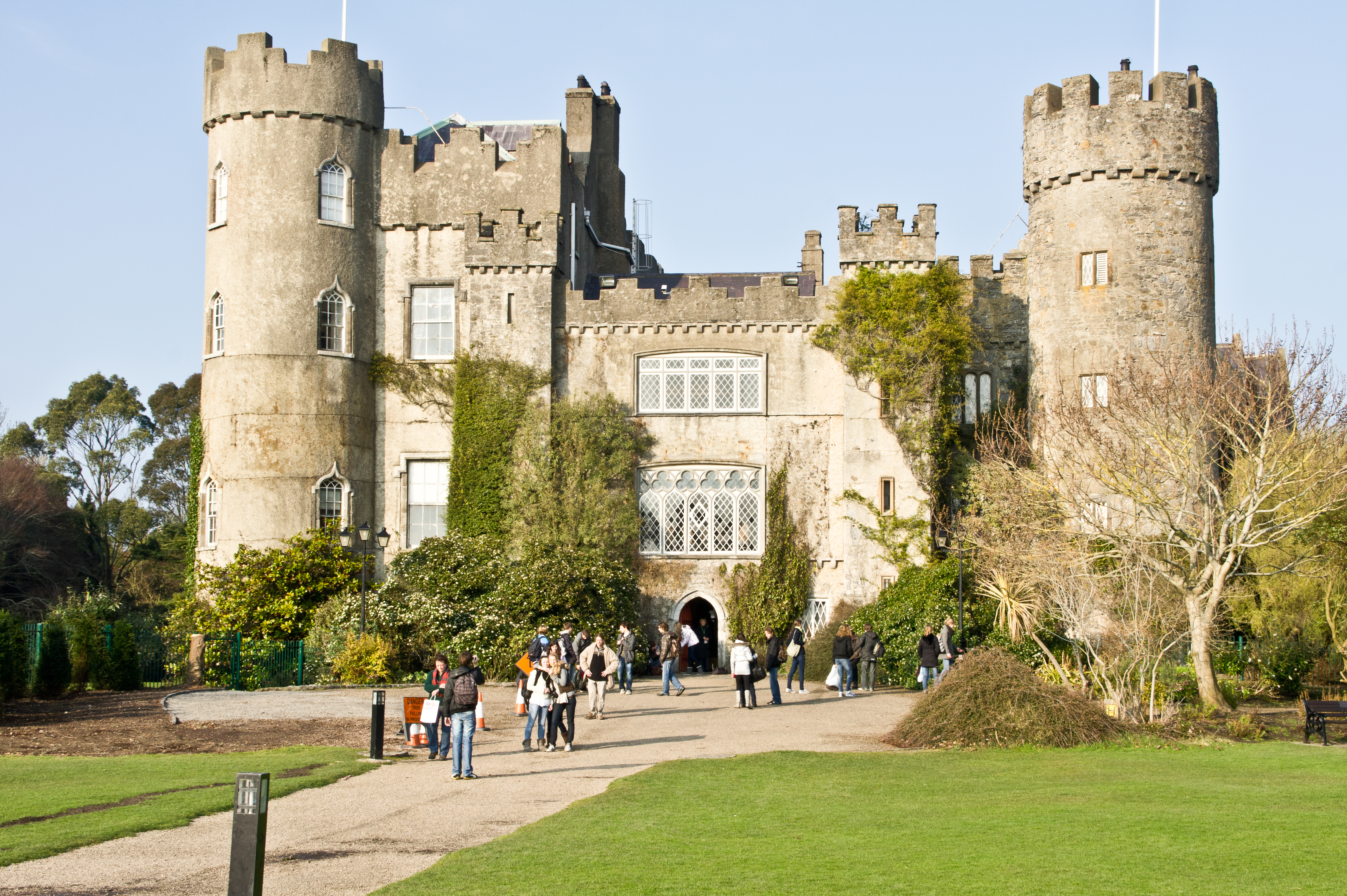 Malahide Castle, Dublin